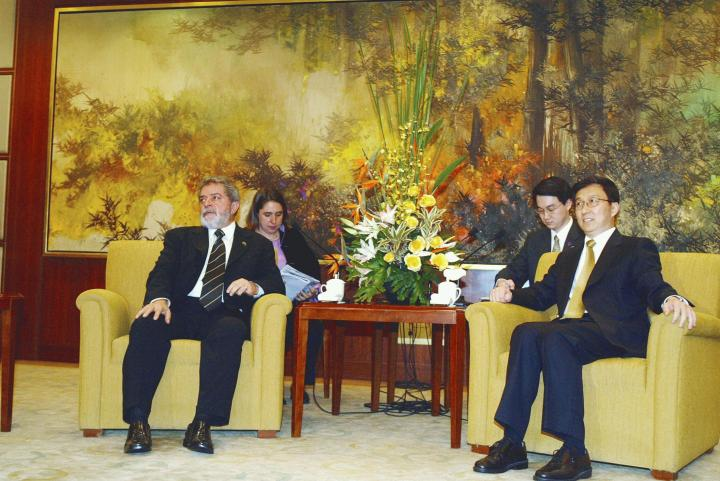 Xangai - O presidente Lula encontra-se com o prefeito de Xangai, Han Zheng. (foto:Ricardo Stuckert)